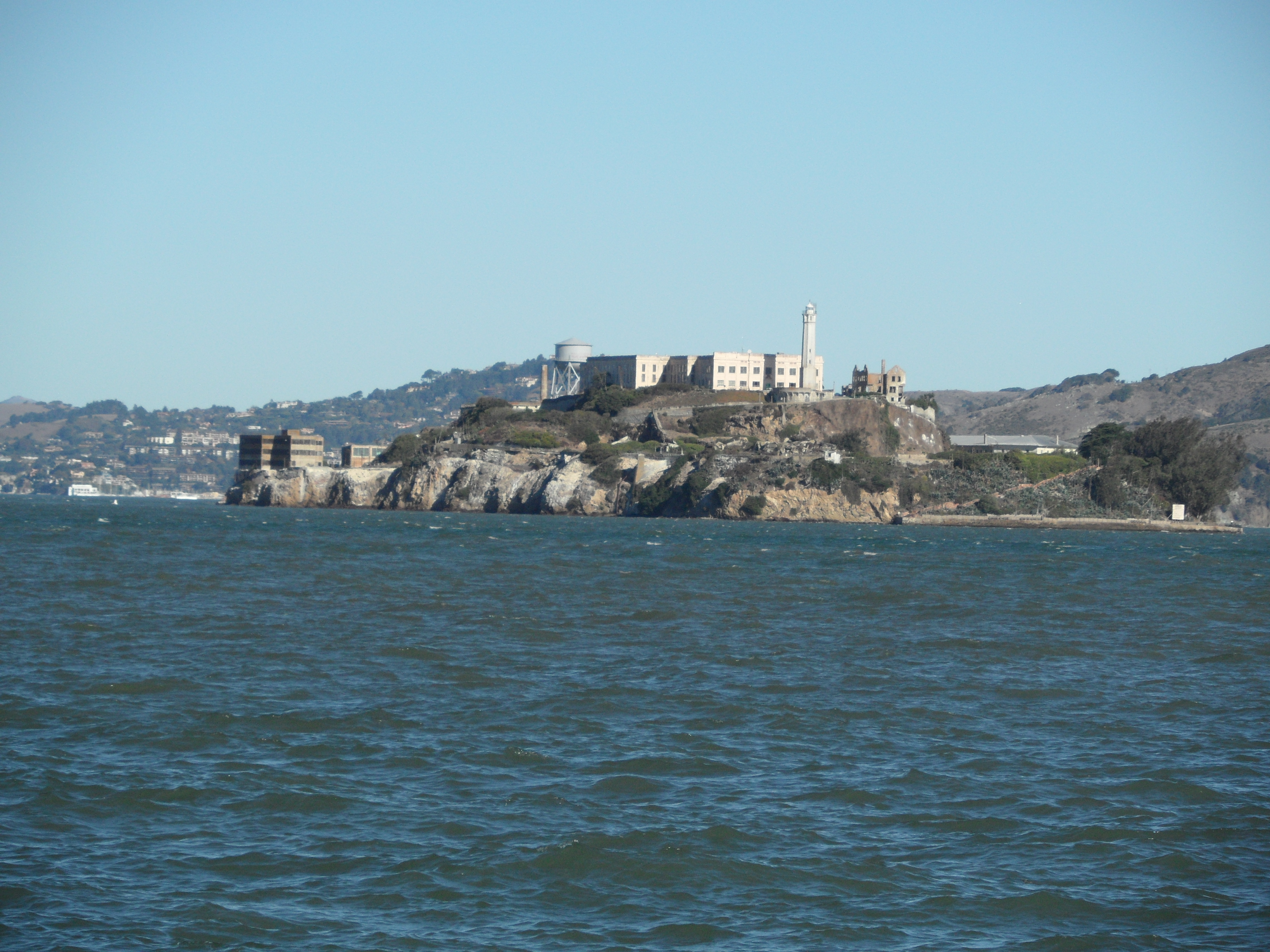 Alcatraz